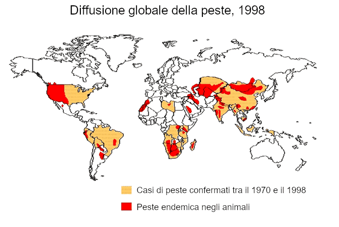 Distribuzione globale della peste, 1998